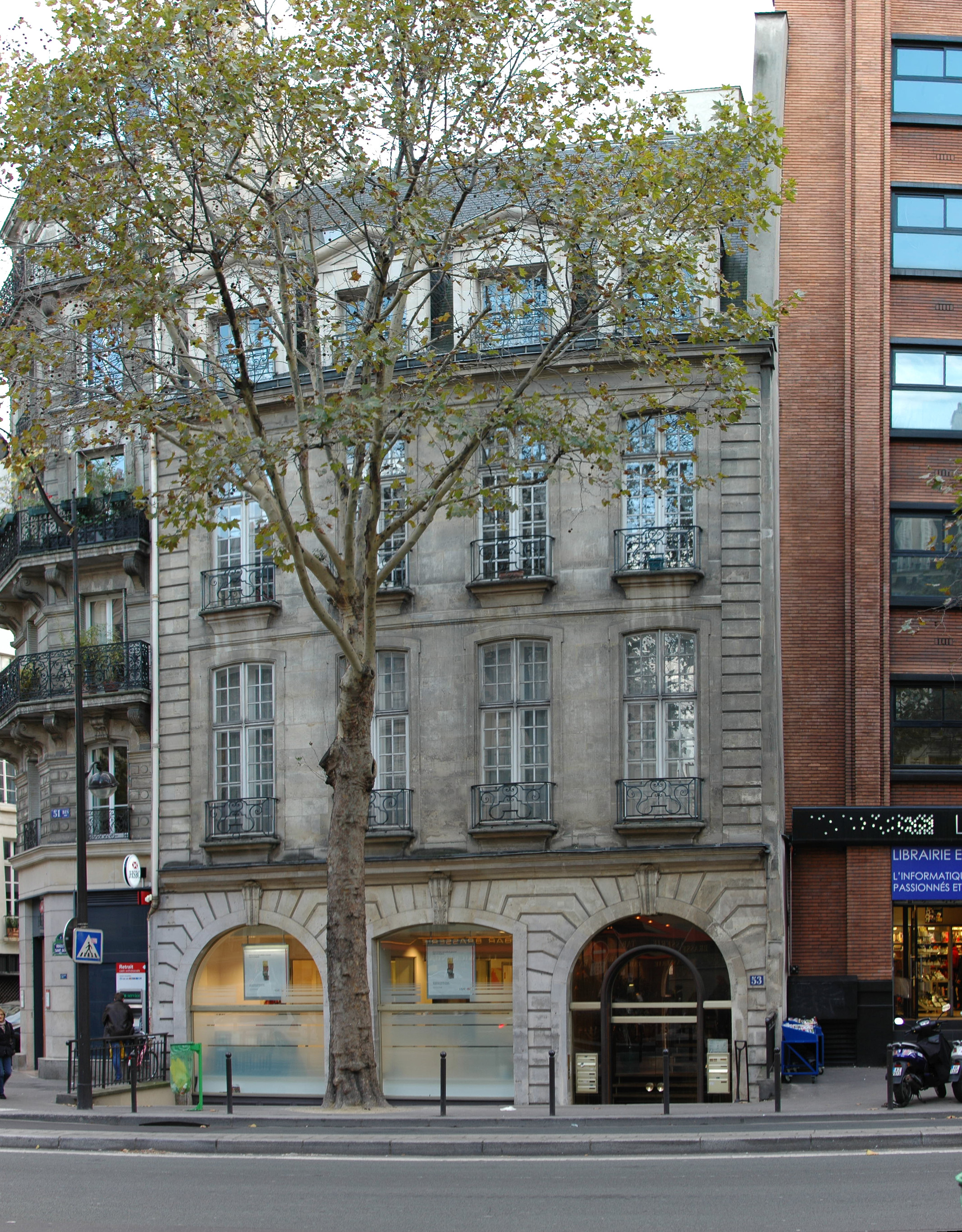 Adresse : Saint-Germain (boulevard) 53 75005 Paris 05 - France Eléments protégés : Façade sur rue : inscription par arrêté du 13 mars 1972 .